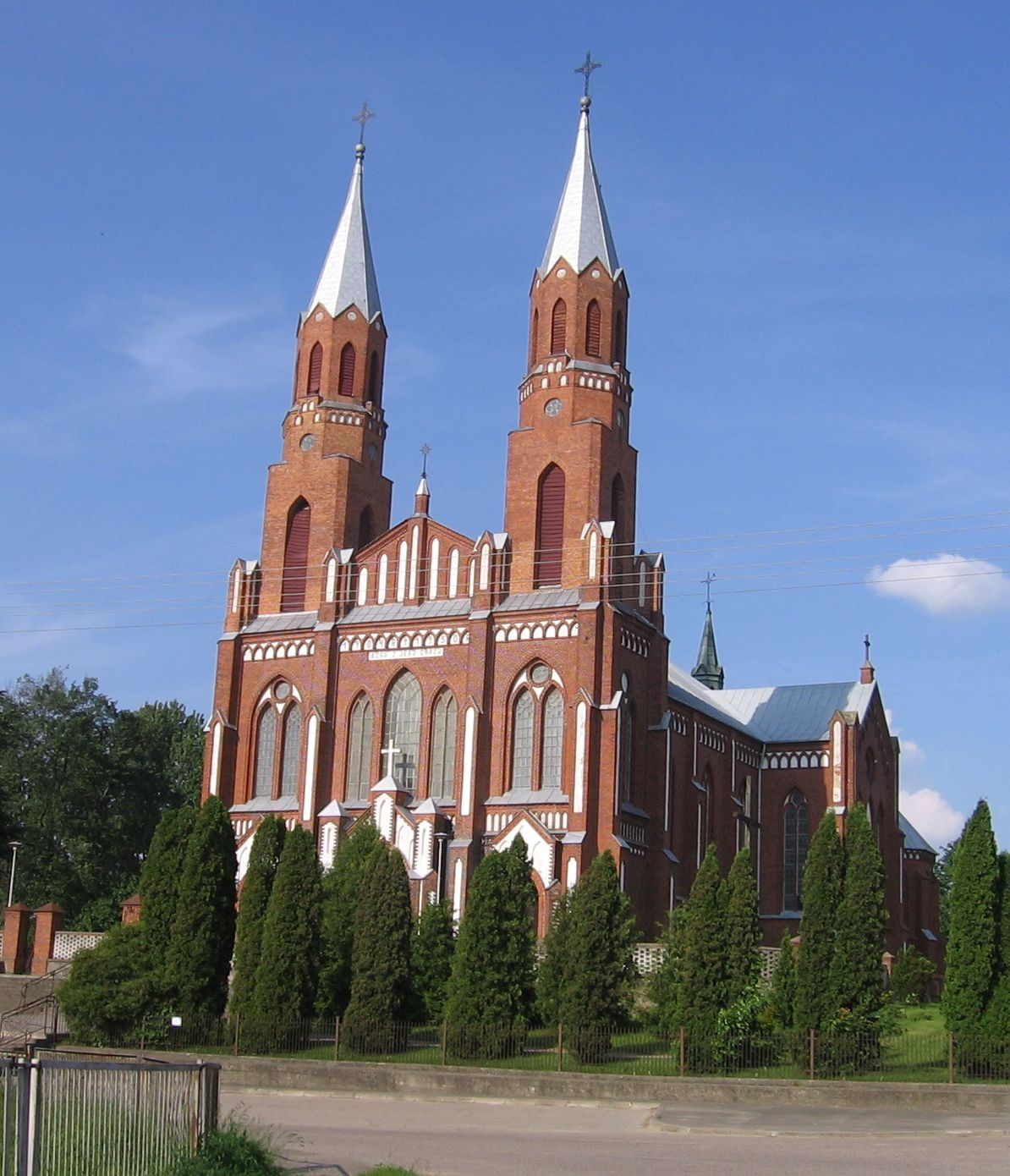 Wyszonki Kościelne - kościół parafialny pw. Narodzenia NMP (1899-1904)